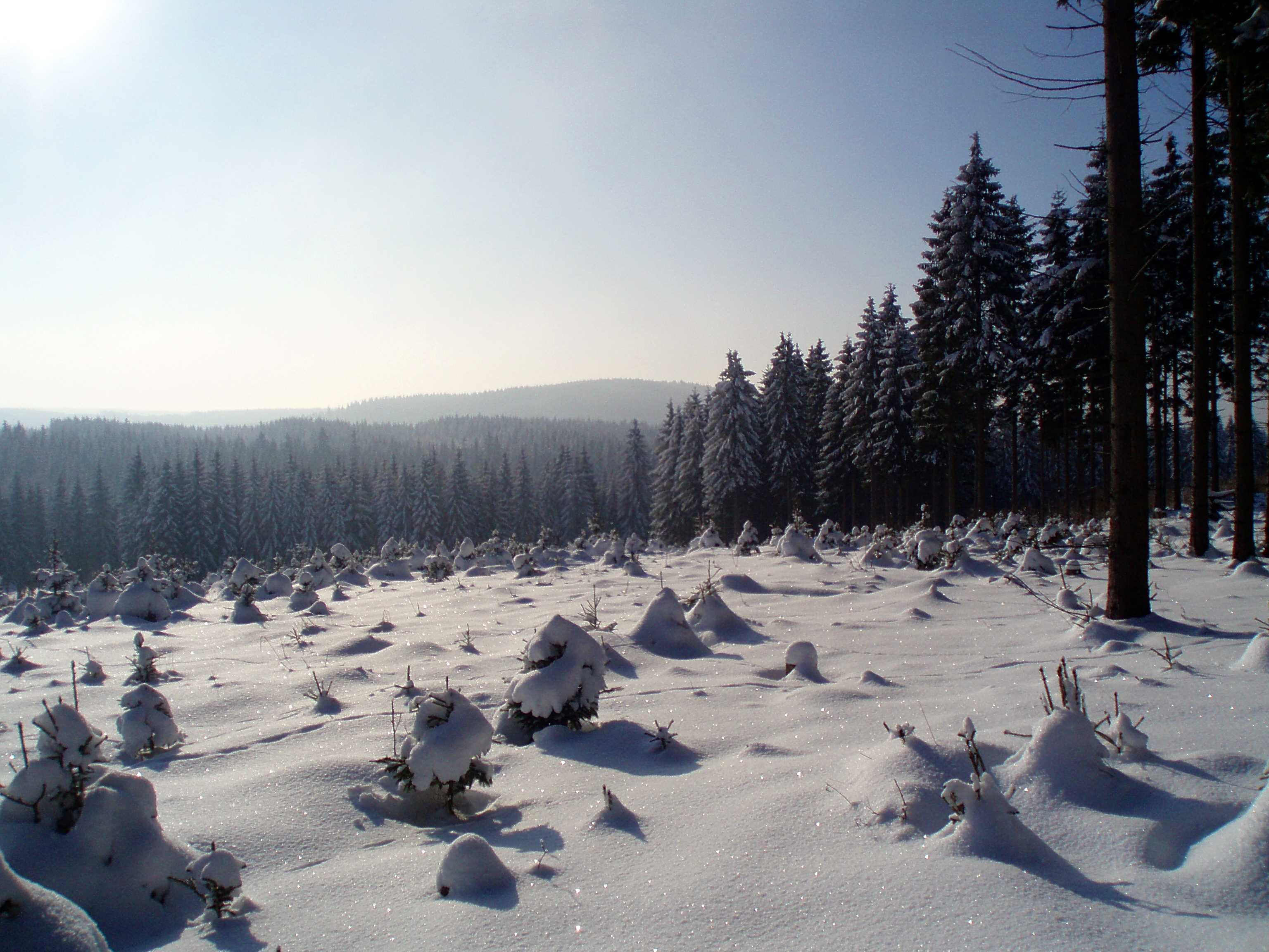 Walts Gott Feld